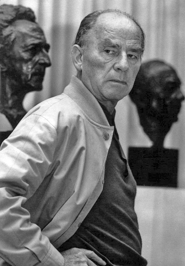 Copyright Museum Arno Breker/MARCO-VG, Bonn Schr. toestemming aan Jos43 tot publicatie in Wikipedia.